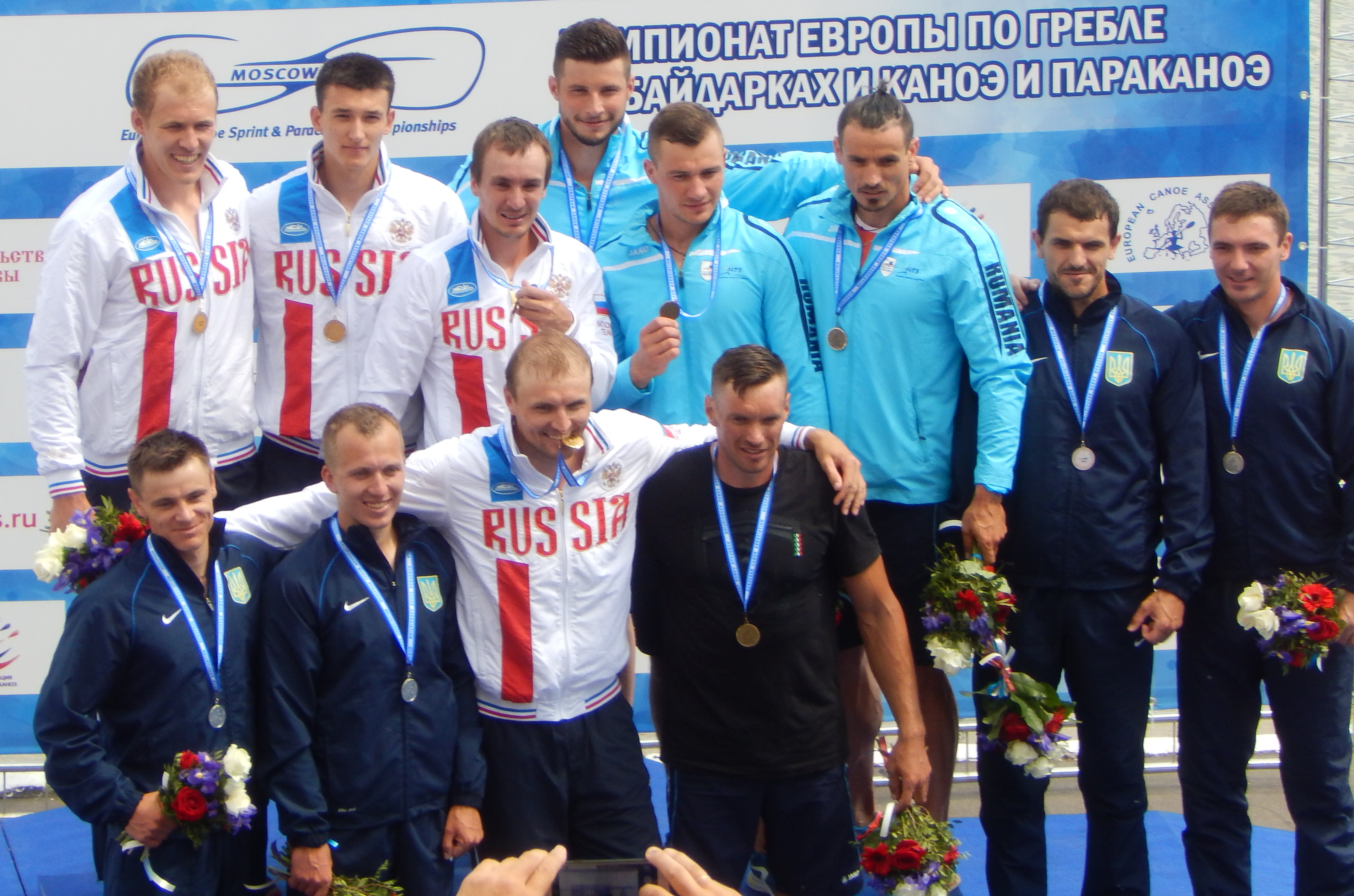 Церемония награждение мужчин в каноэ-четвёрке 1000 м